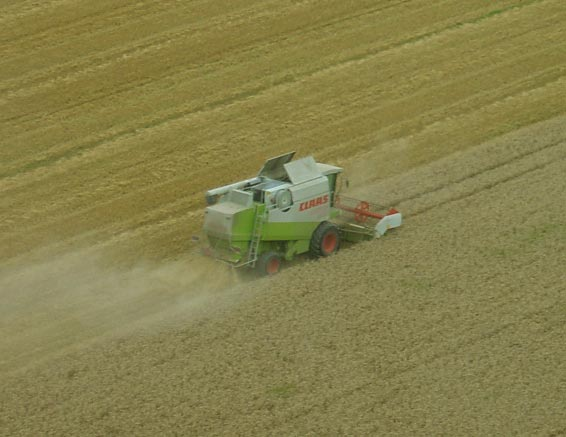 Mähdrescher Claas Lexion 405 aus der Vogelperspektive